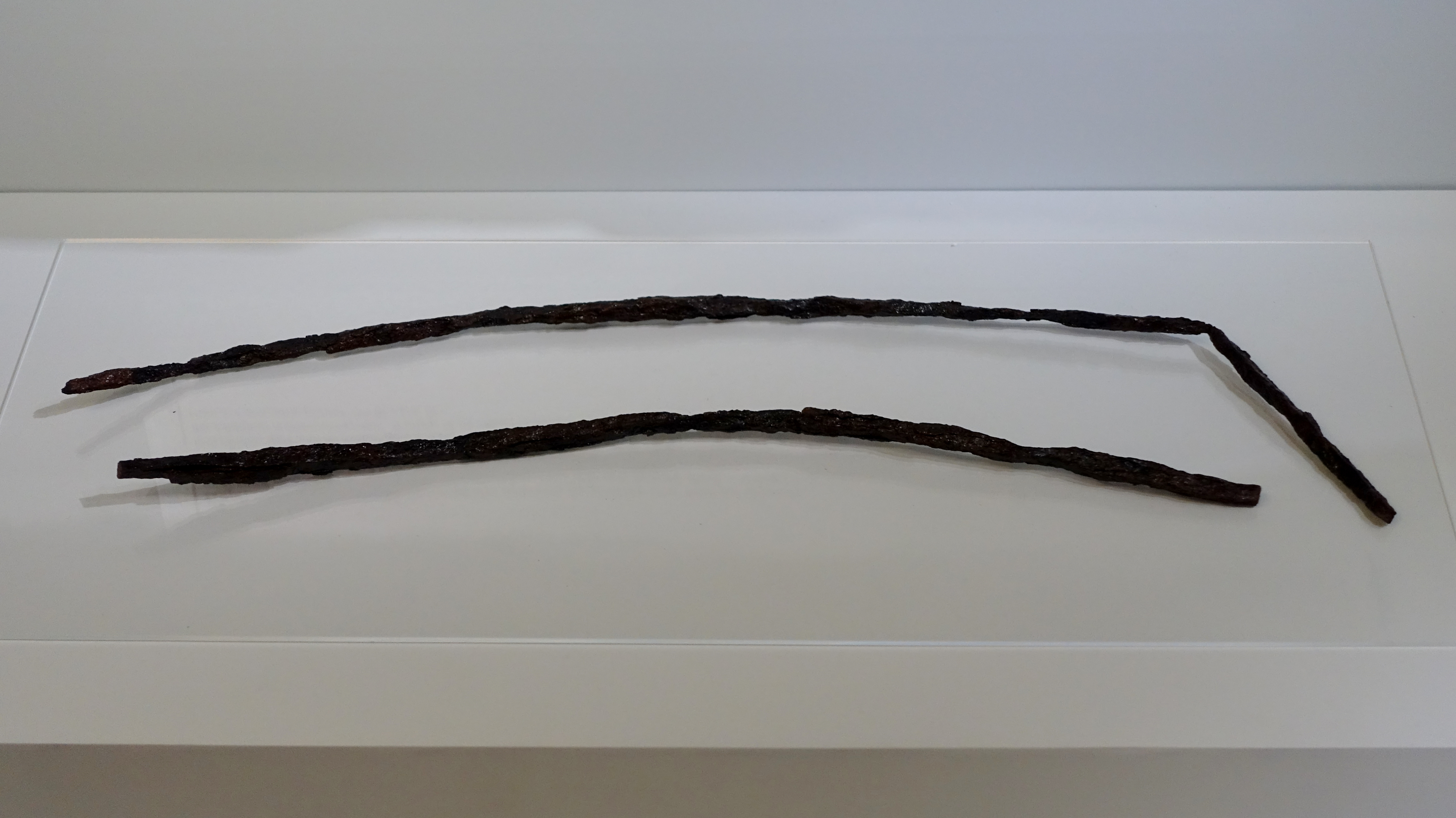 Oboloi aus Eisen, geometrische Zeit (9.-8. Jahrhundert v. Chr.), aus Dreros, ausgestellt im Archäologischen Museum Iraklio, Kreta, Griechenland